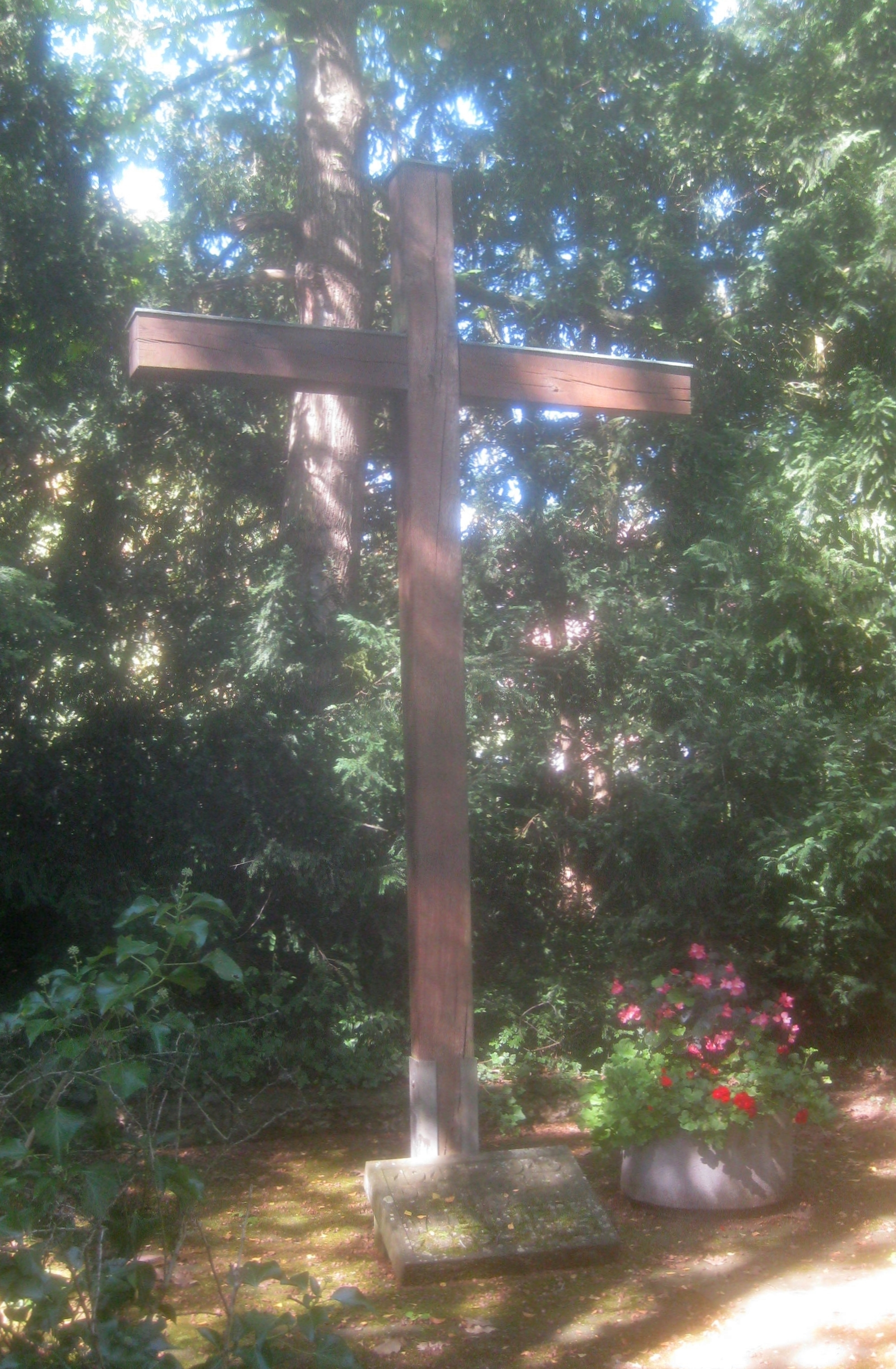 Mahnmal für die Opfer der Gemeinde Rohr im Zweiten Weltkrieg, Kreuz und Schrifttafel von Erich Fritz, Stuttgart, Friedhof Rohr.